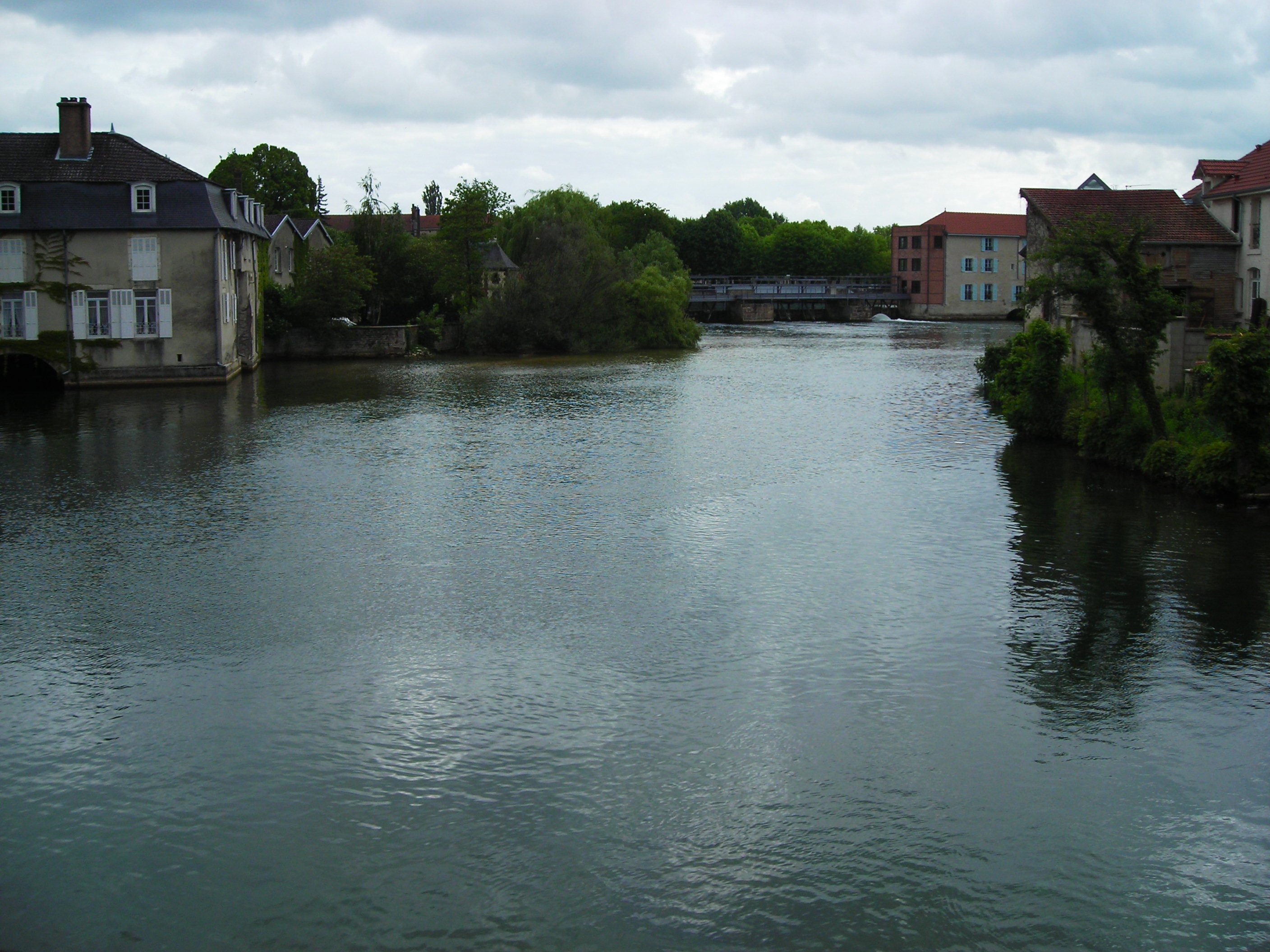 L'Aube à la sortie de Bar-sur-Aube